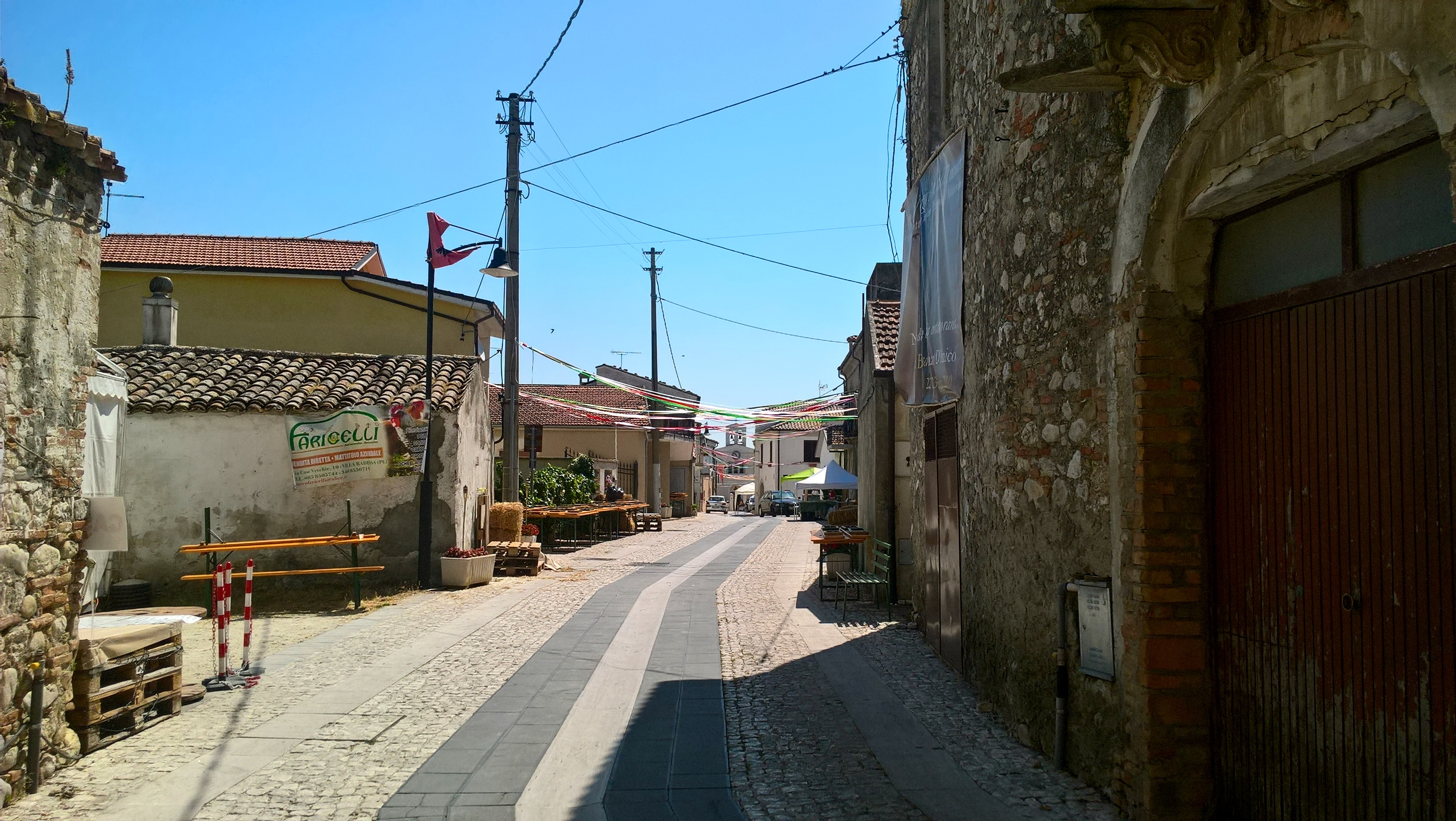 Via Italia; im Hintergrund Chiesa Santa Maria Assunta